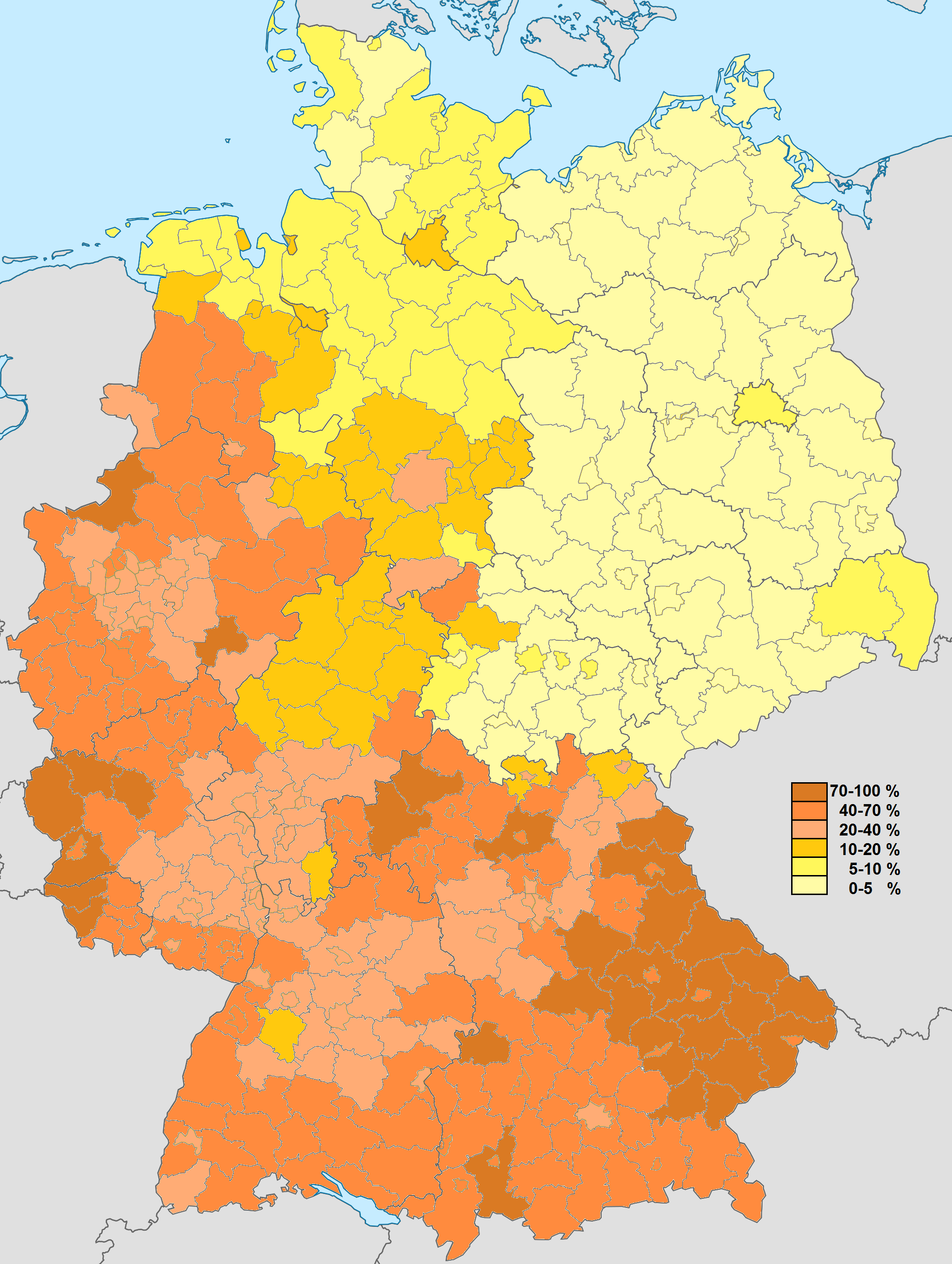 Anteil der katholischen Bevölkerung auf Landkreisebene nach Ergebnissen des Zensus 2011 in Deutschland.